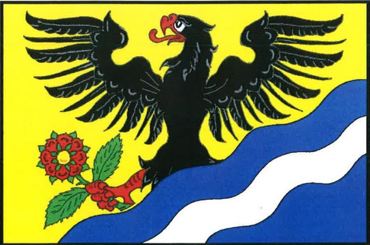 vlajka, Sudislav nad Orlicí, okres Ústí nad Orlicí